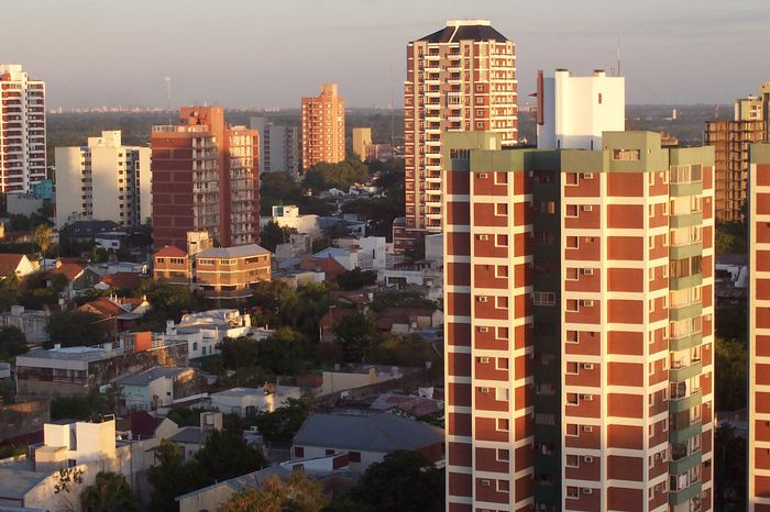 Vista del skyline del noreste del macrocentro de la ciudad de Resistencia desde un piso 17.